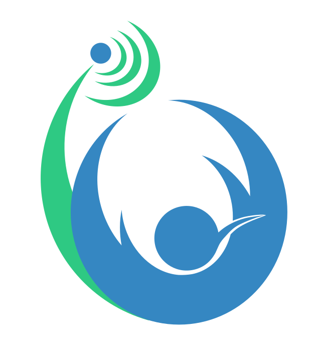 Logo de la distribución EterTICs GNU/Linux en PNG